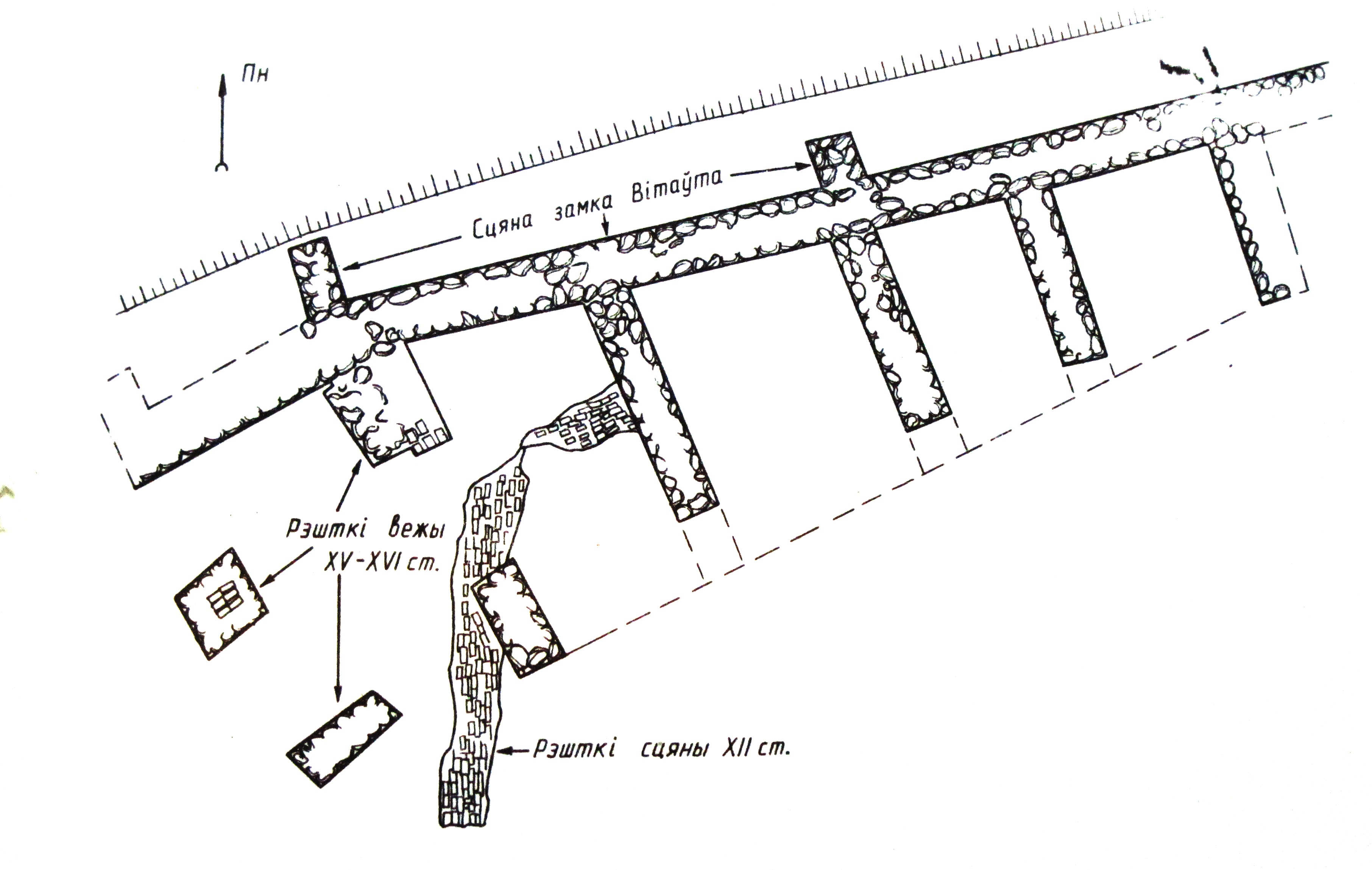 Стары замак, Гродна. План сцяны 12 ст.